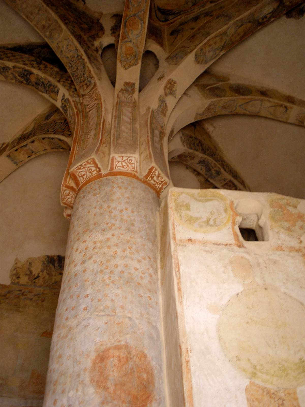 Ermita mozárabe de San Baudelio de Berlanga (Soria)